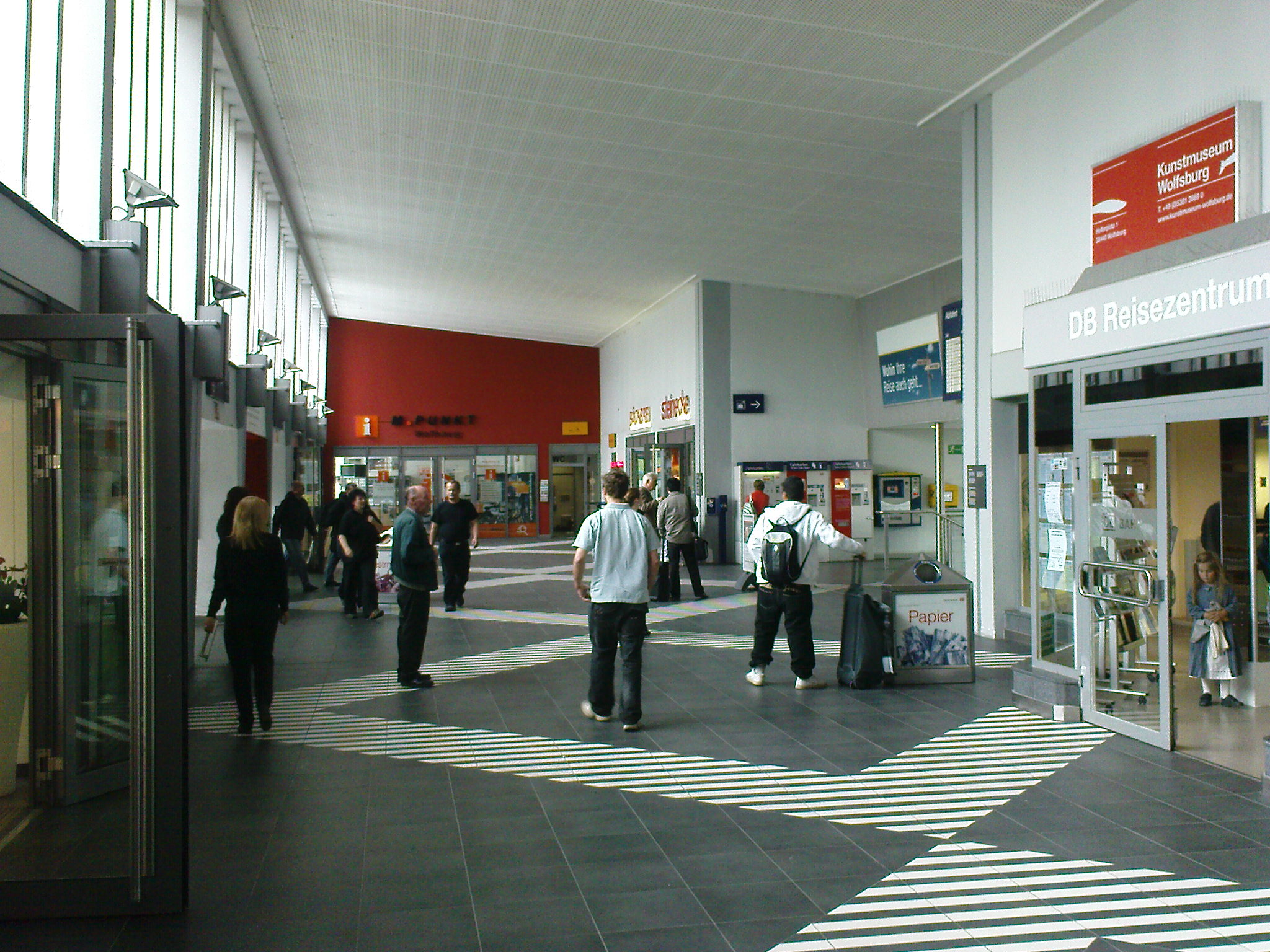 Empfangshalle des Wolfsburger Hauptbahnhofes